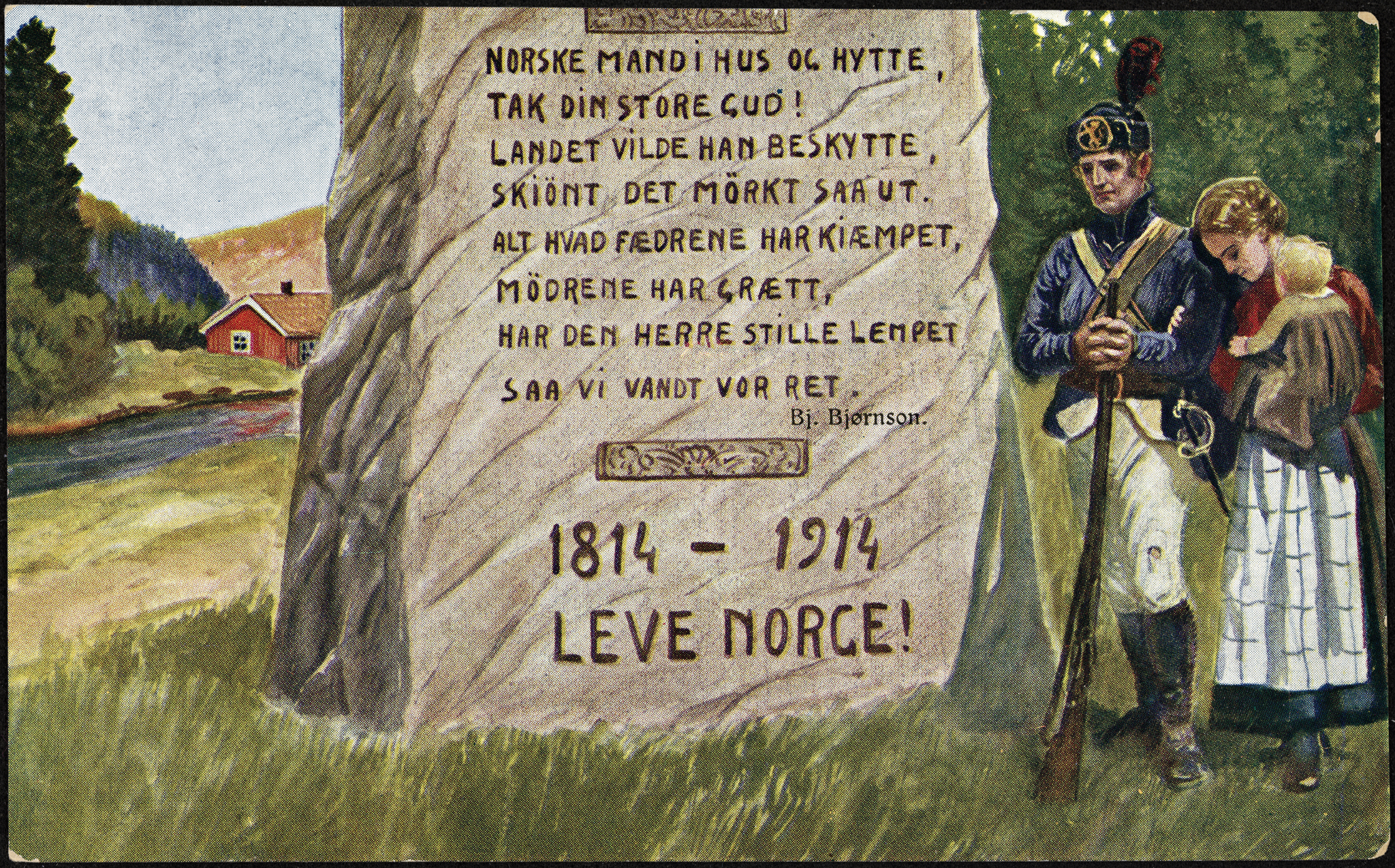 Tittel / Title: 1814-1914 Leve Norge! Beskrivelse / Description: Postkort. Utdrag fra "Ja, vi elsker" av Bjørnstjerne Bjørnson. Kunstner / Artist: ukjent / unknown Utgiver / Publisher: ukjent / unknown Utgitt / Published: 1914 Eier / Owner Institution: Nasjonalbiblioteket / National Library of Norway Lenke / Link: Bildesignatur / Image Number: blds_05723